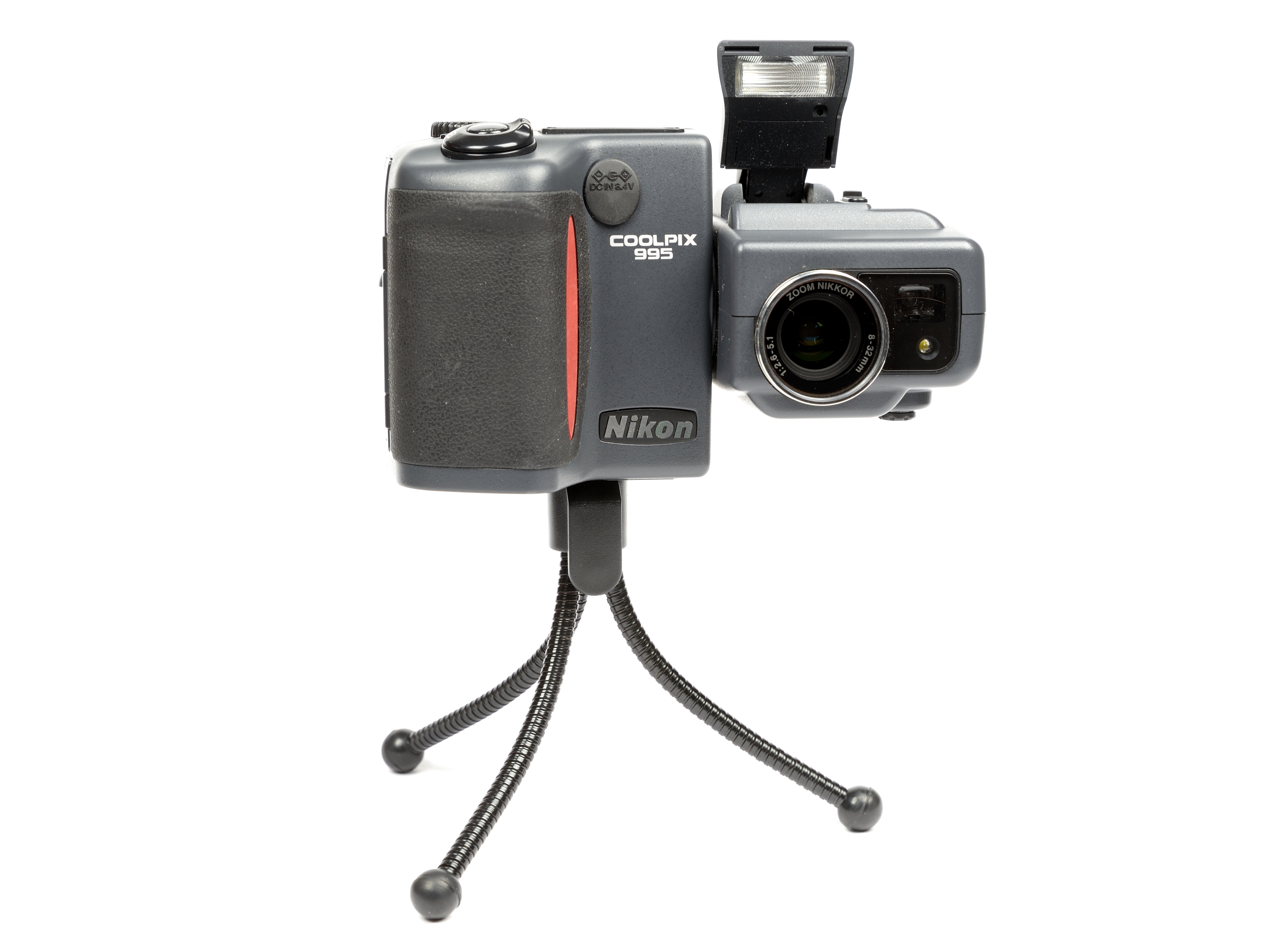 Appareil photo Nikon Coolpix 995.